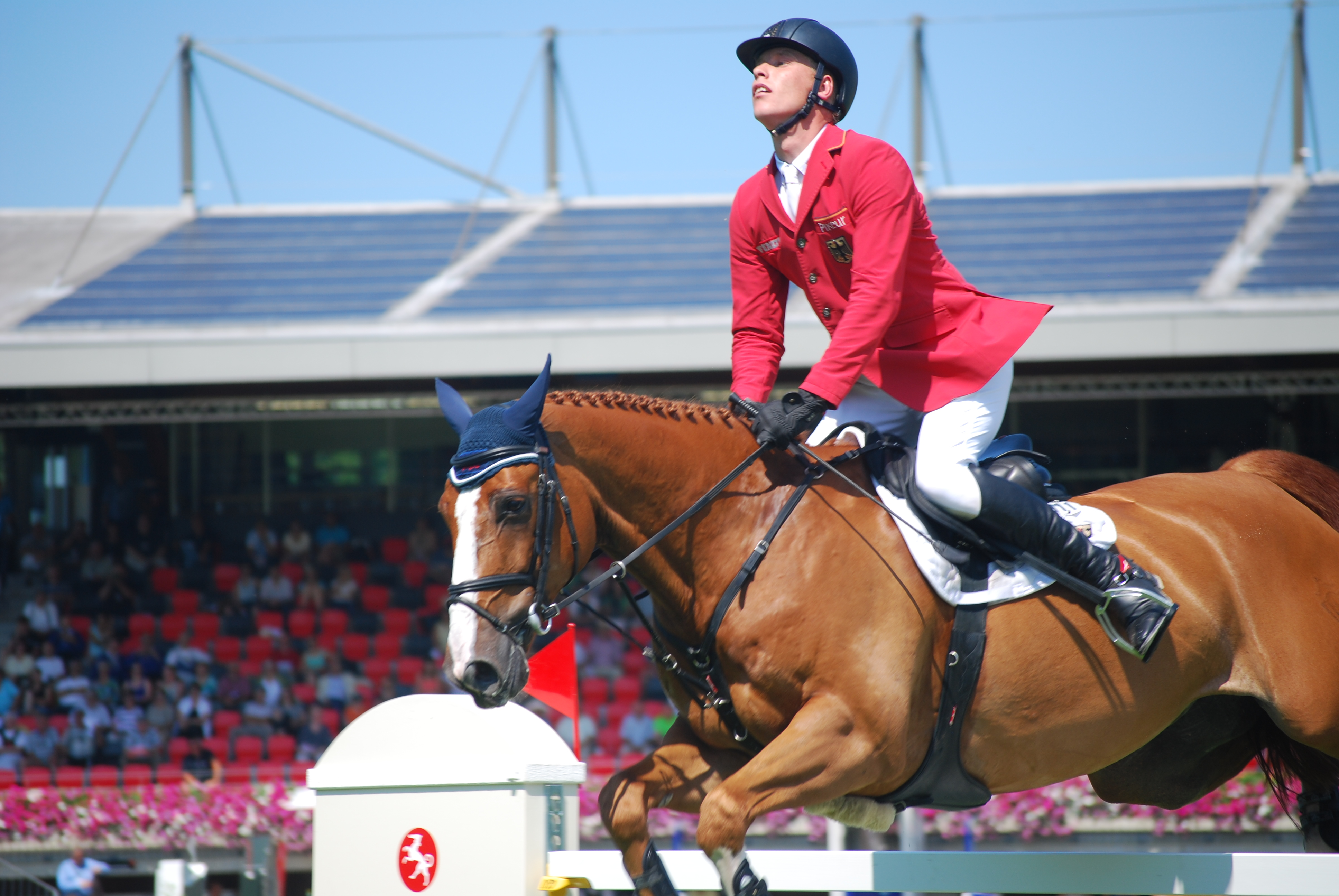 Romain Duguet auf Quoride de Treho